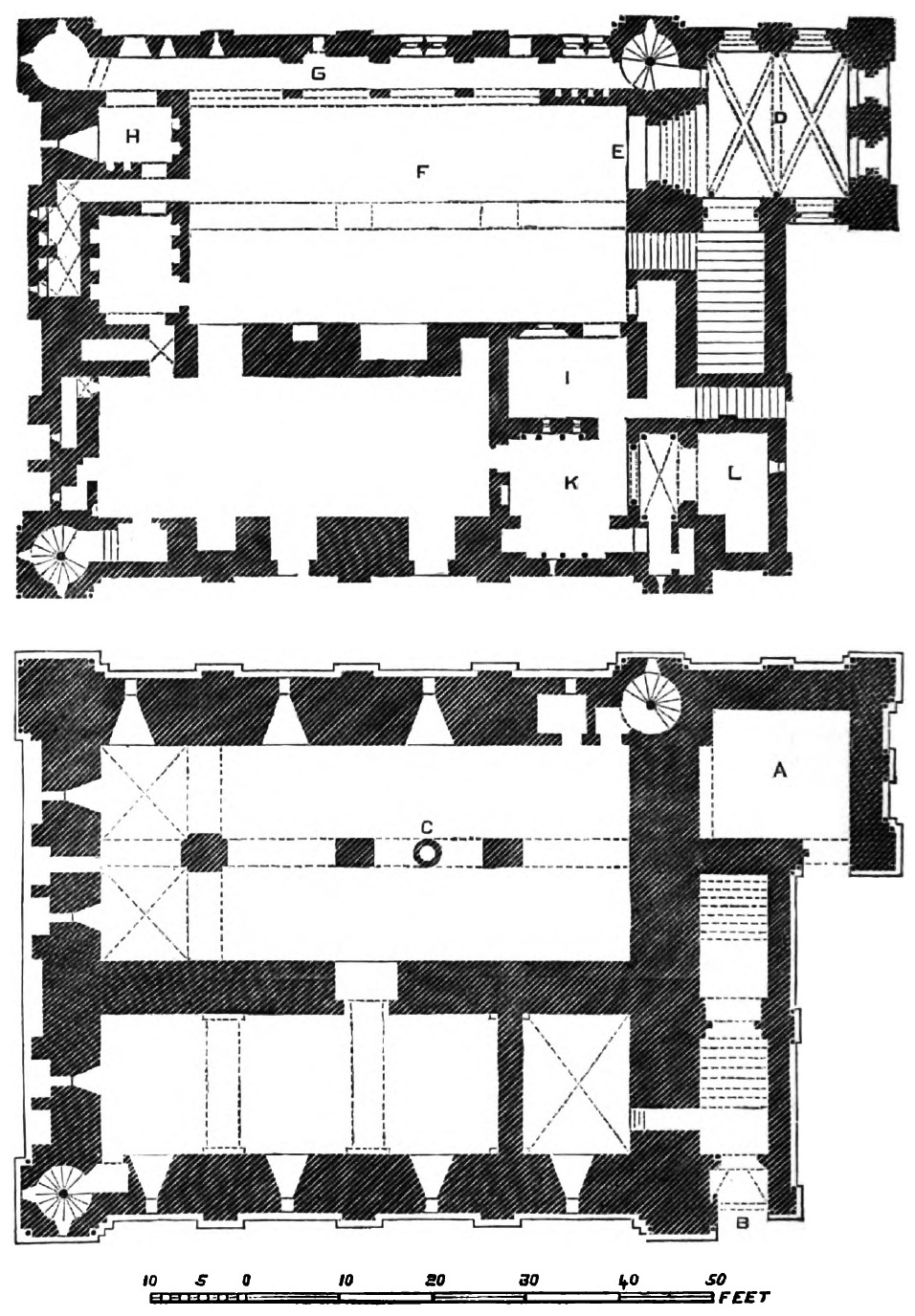 Grundrisse des Keeps von Castle Rising Castle in Norfolk